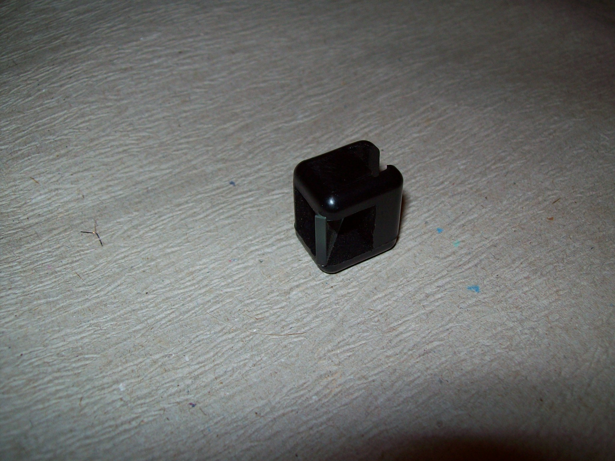 Zielkontrollspiegel Gewehr FN FAL